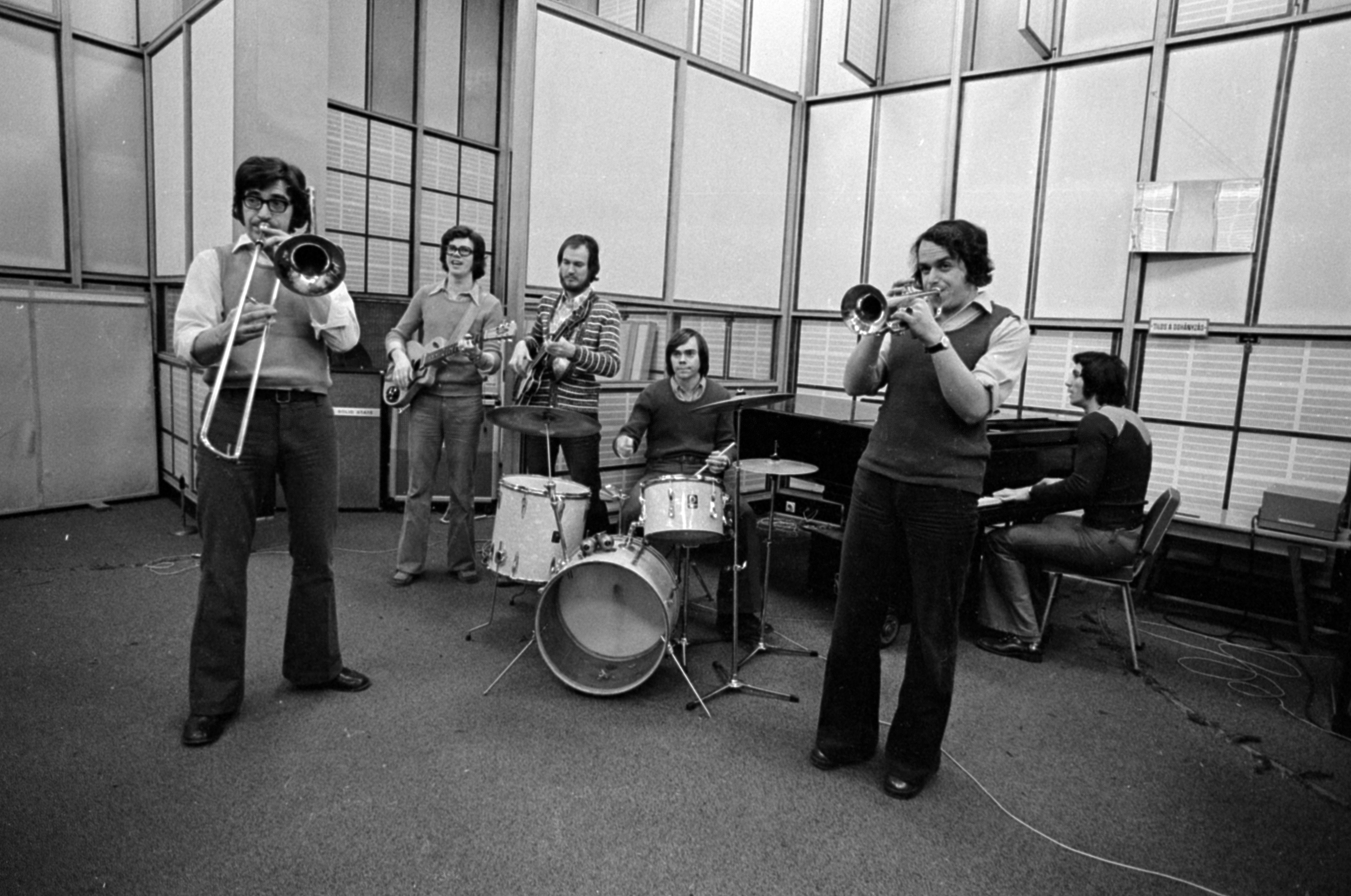 A Magyar Rádió stúdiója, az Express együttes. Kalmusz Pál (pozan), Solymos Antal (gitár), Silye Attila (basszusgitár), Kangyal Ferenc (dob), Malek Miklós (trombita), Magyar Csaba (billentyűs).